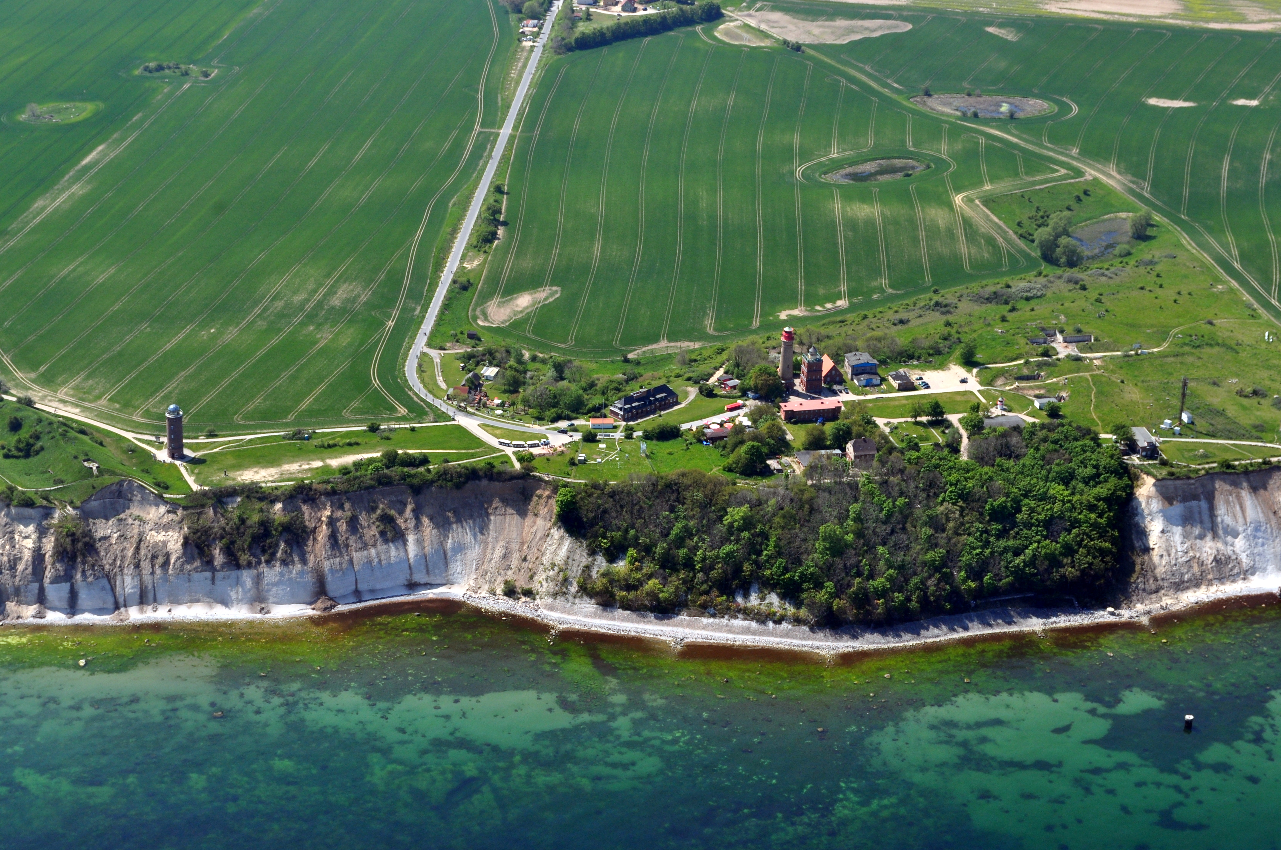 Die Bilder wurden von mir während eines einstündigen Rundflugs ab Flugplatz Güttin am 21. Mai 2011 aufgenommen. Die Bildbeschreibung steht im Dateinamen. Aufgenommen mit einer Nikon D5000 durch das Seitenfenster des Flugzeugs.